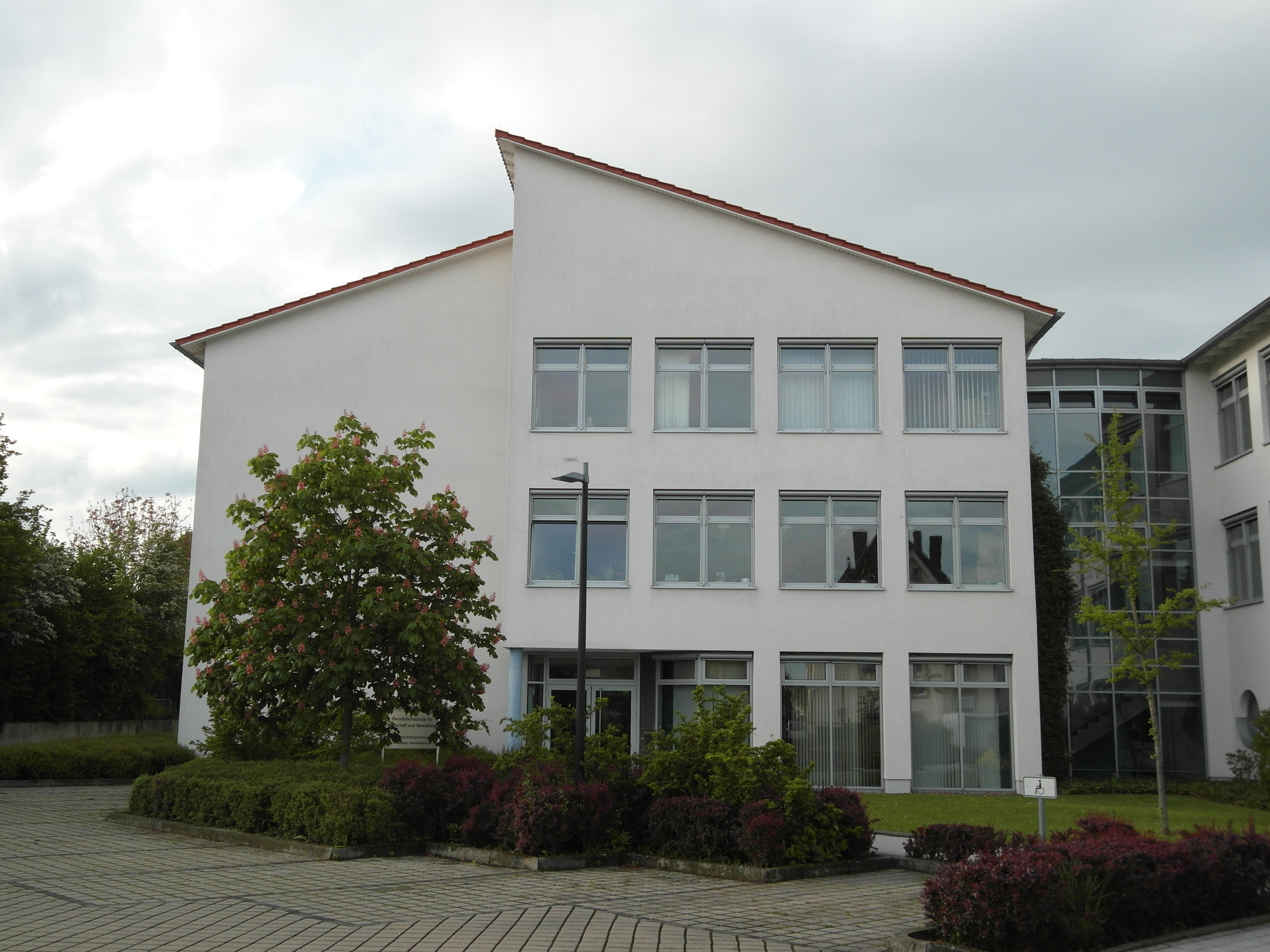 Dieses Foto zeigt das Bonifatiushaus der Schulen der Brede.